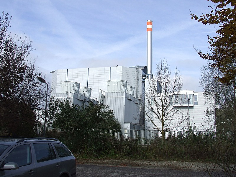 Forschungsreaktor FRM II der TU München in Garching